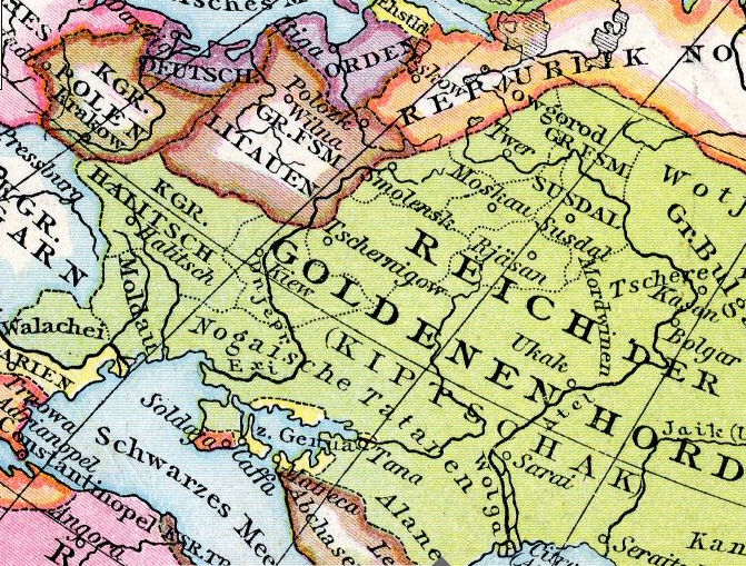 Allgemeiner historischer Handatlas